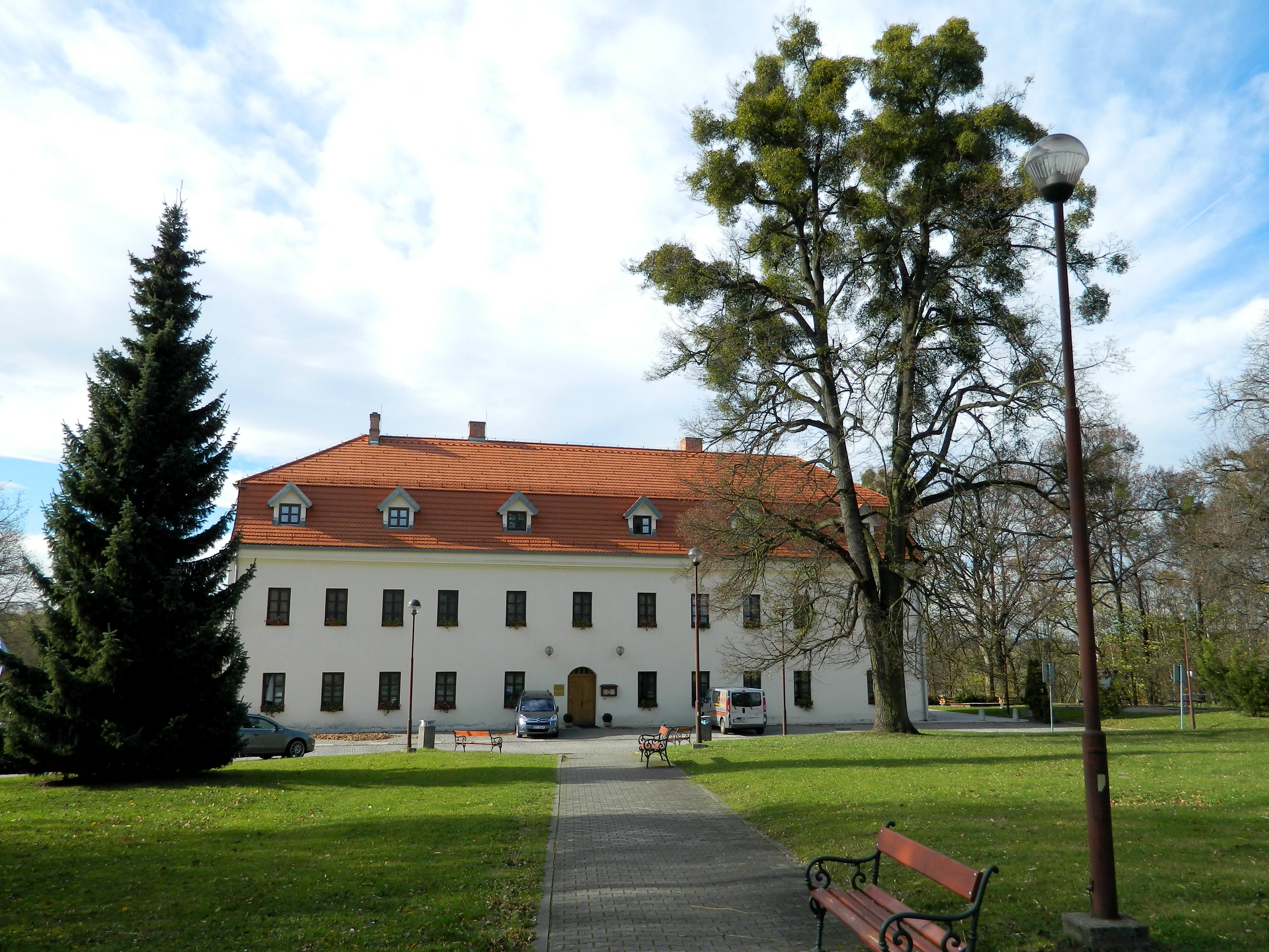 Současná podoba zámku Šumbark v Havířově-městě